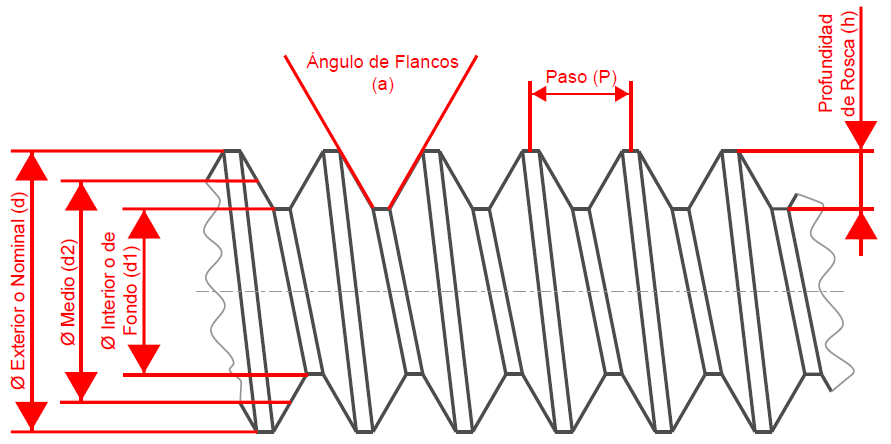 Elementos los cuales definen la rosca en sus diferentes tipos.